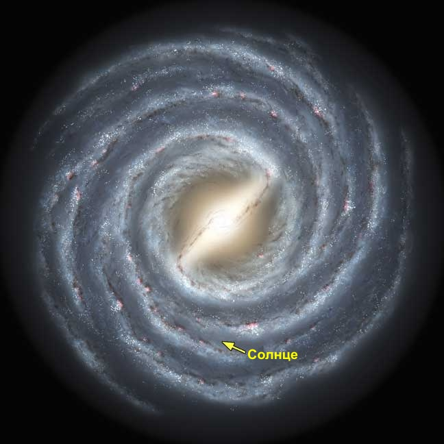 Предполагаемая структура Млечного Пути. Данные, полученные с помощью телескопа Спитцер